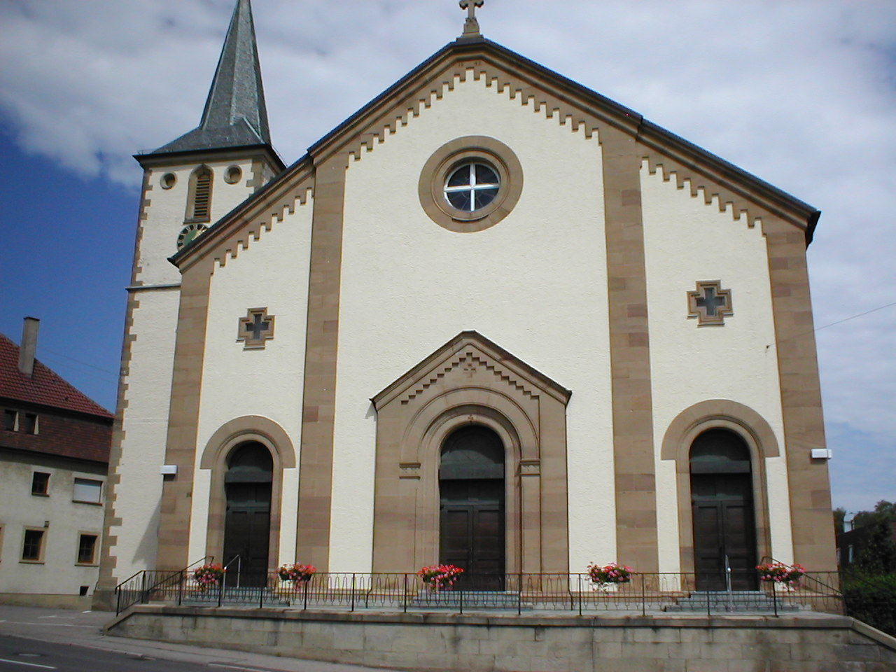 St. Alban in Heilbronn-Kirchhausen, erbaut 1842